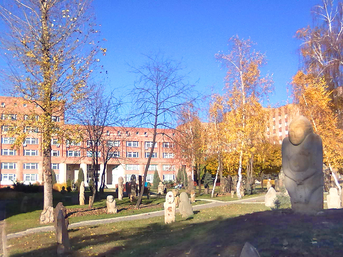 ЛНУ ім. Тараса Шевченка: Парк-музей кам'яних баб (Луганськ)